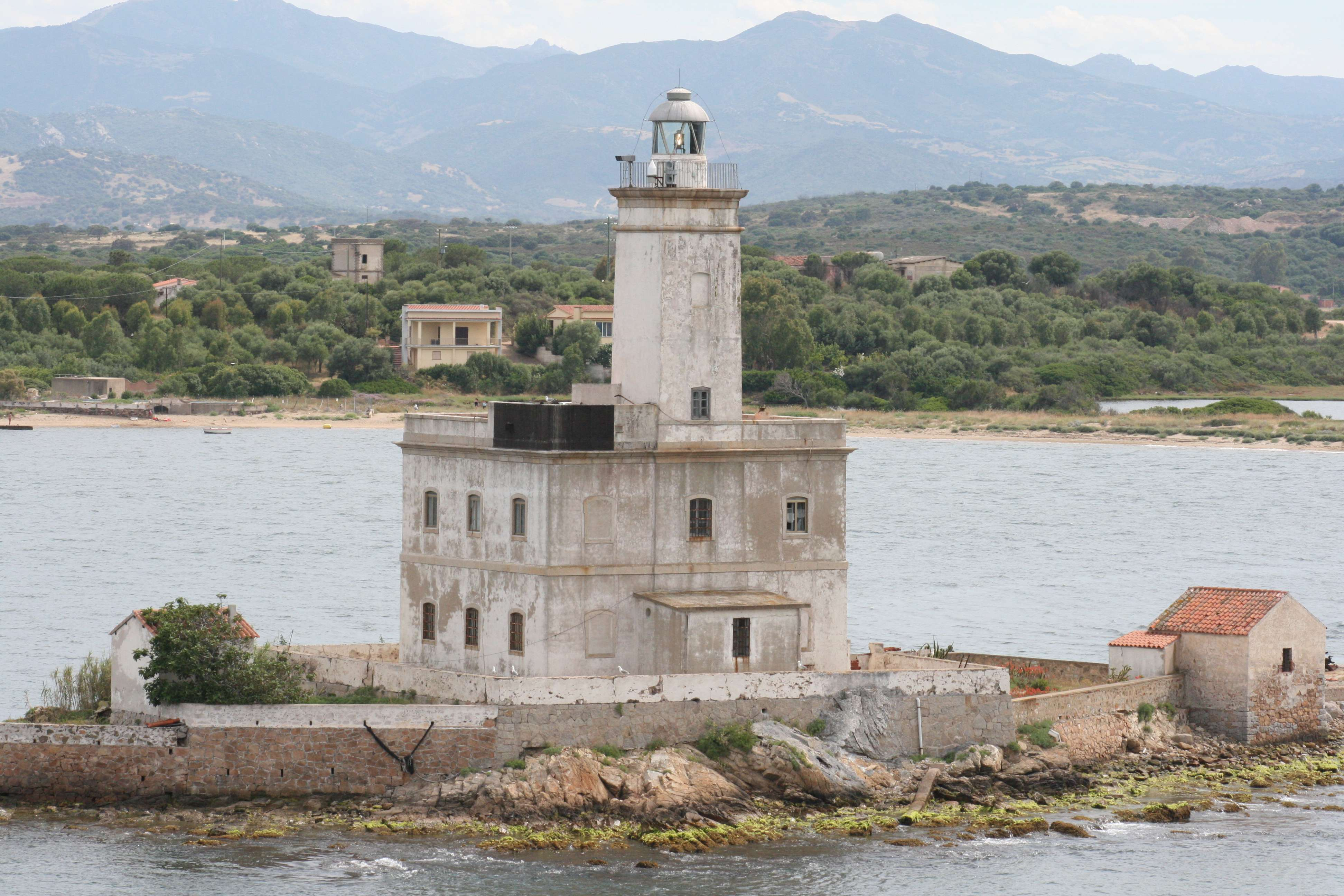 Faro di Olbia sull'Isola della Bocca